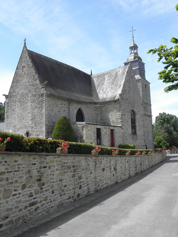 Chevet et flanc nord de l'église Saint-Pierre et Saint-Paul de Montreuil-sous-Pérouse (35).